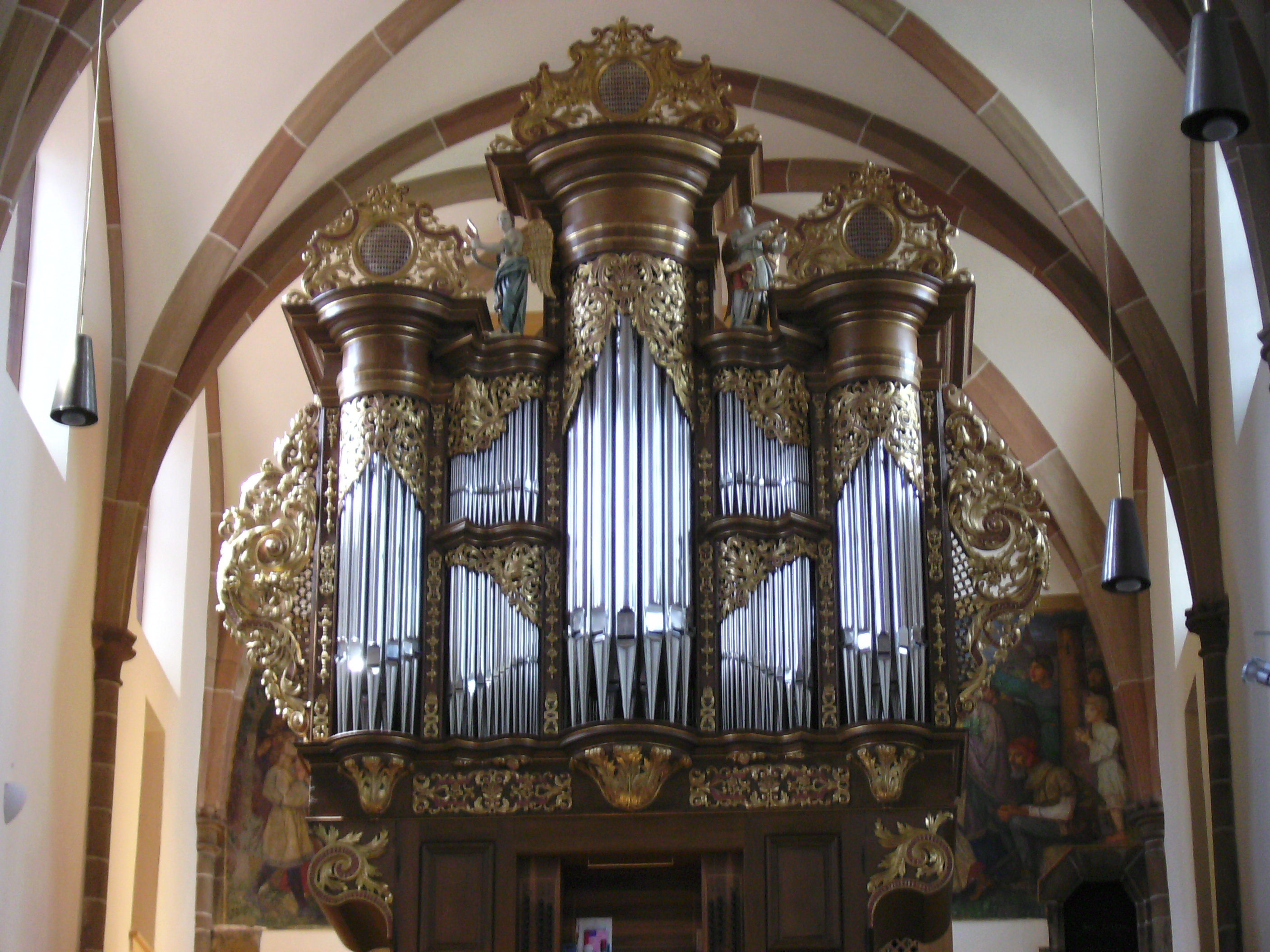 Landau: evangelische Stiftskirche, Barock-Orgel